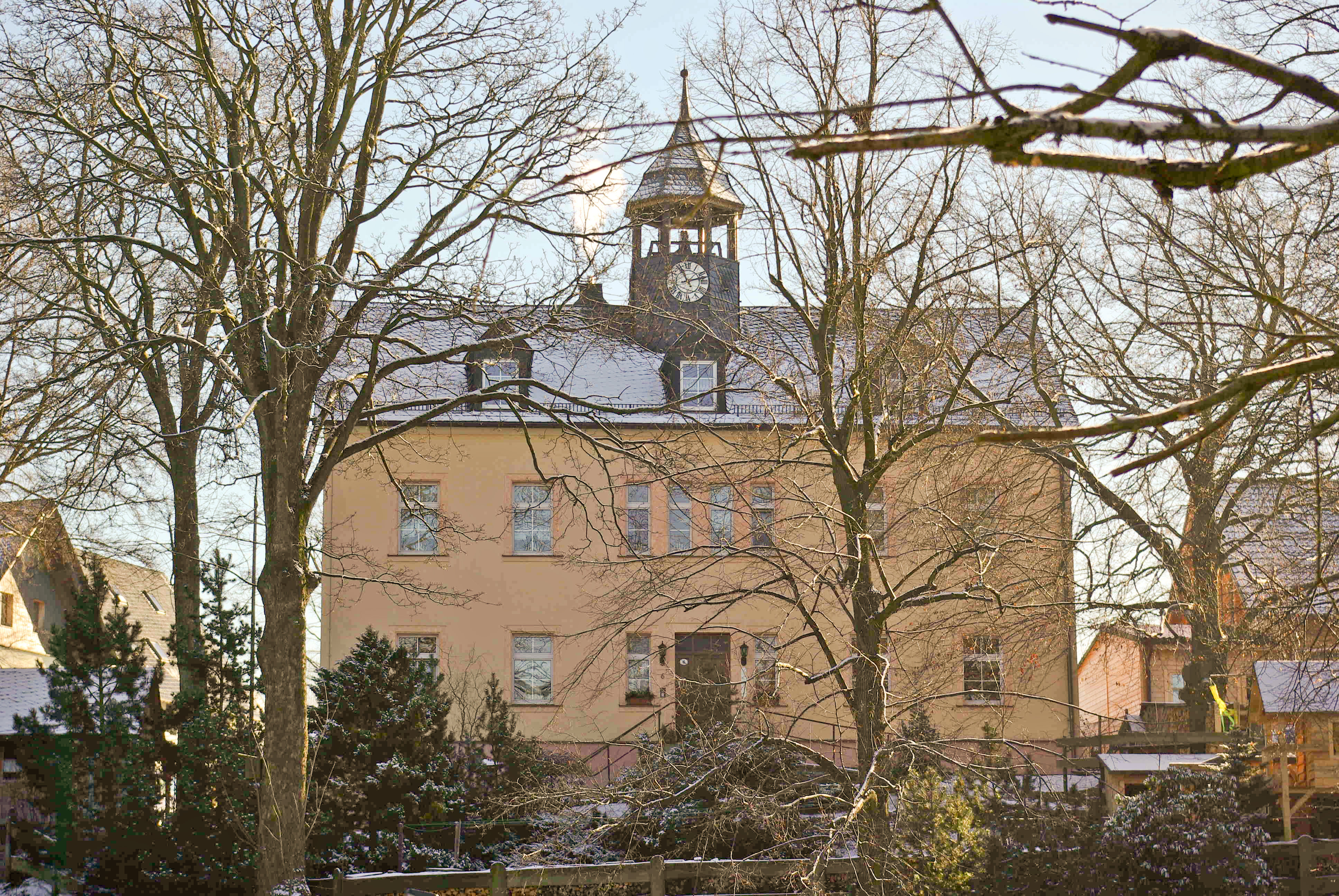 Die Schule Lindenau 1853 bis 1993